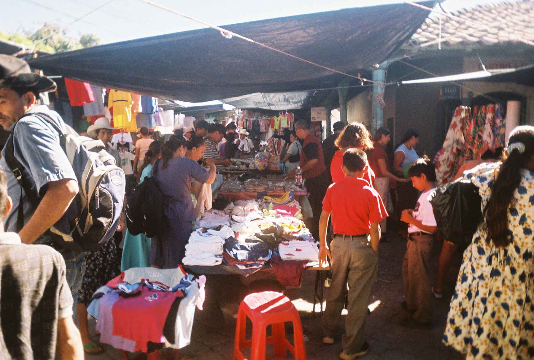 Salvadoran open-air market in Morazán department